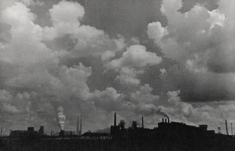 Индустриализация в СССР. Армянская ССР. Завод «Каучук» в Ереване (до 2016 года «Завод Наирит»)